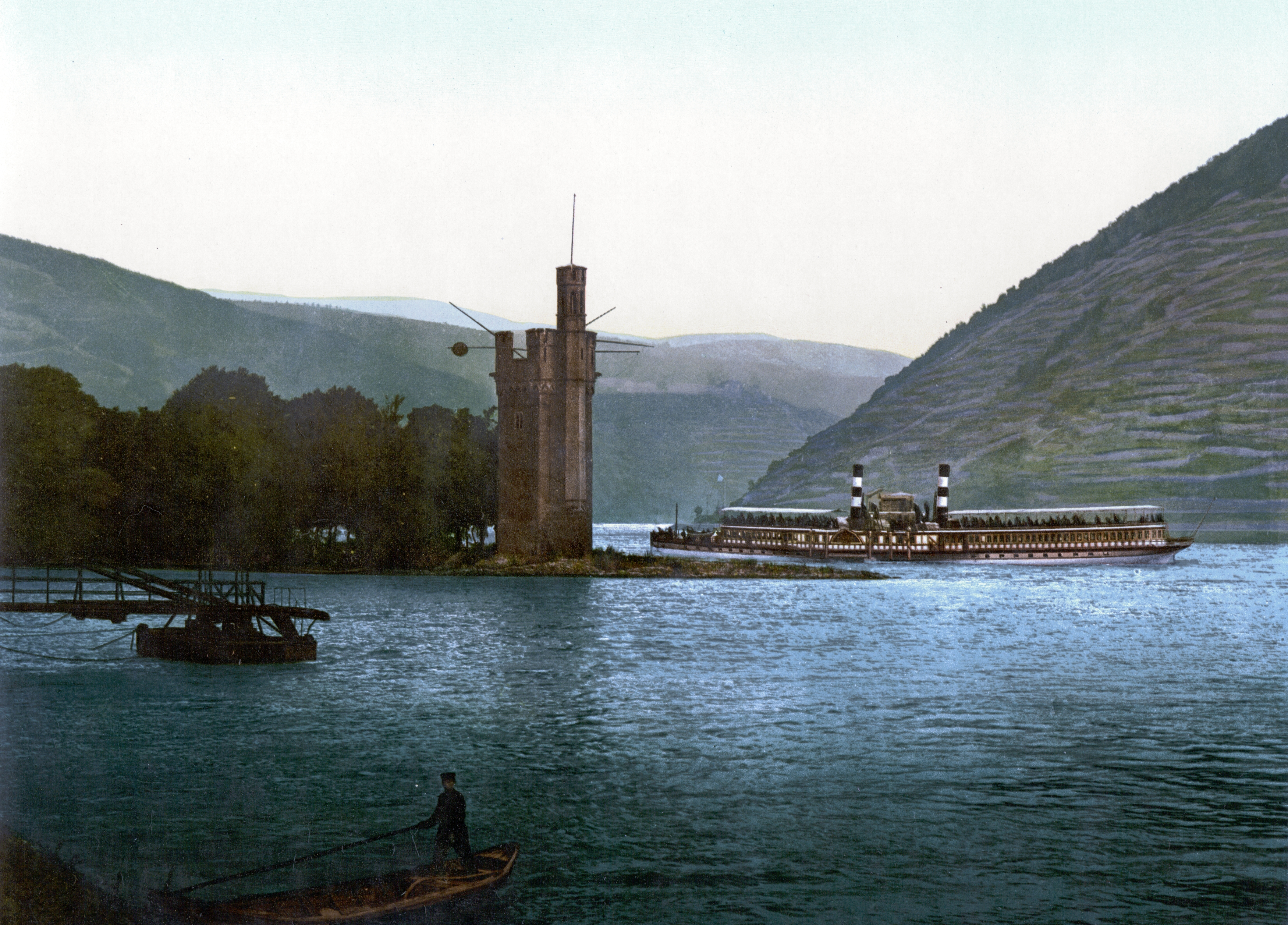 Binger Mäuseturm zwischen 1890 und 1900